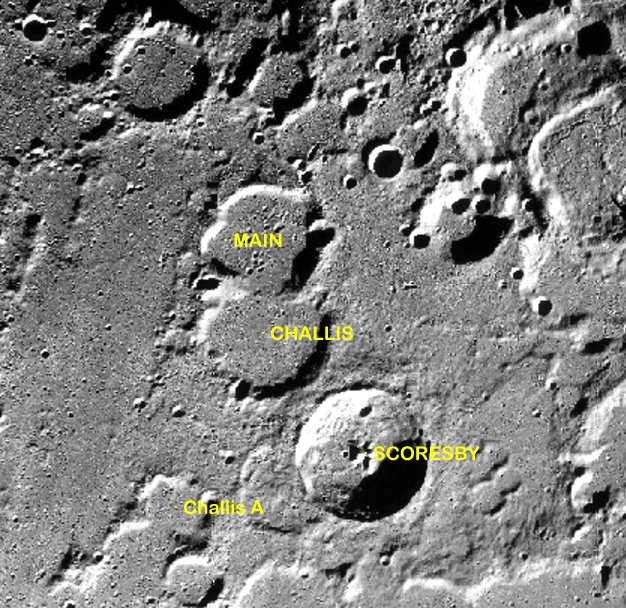 Cráter Challis (Satélites) (LROC)